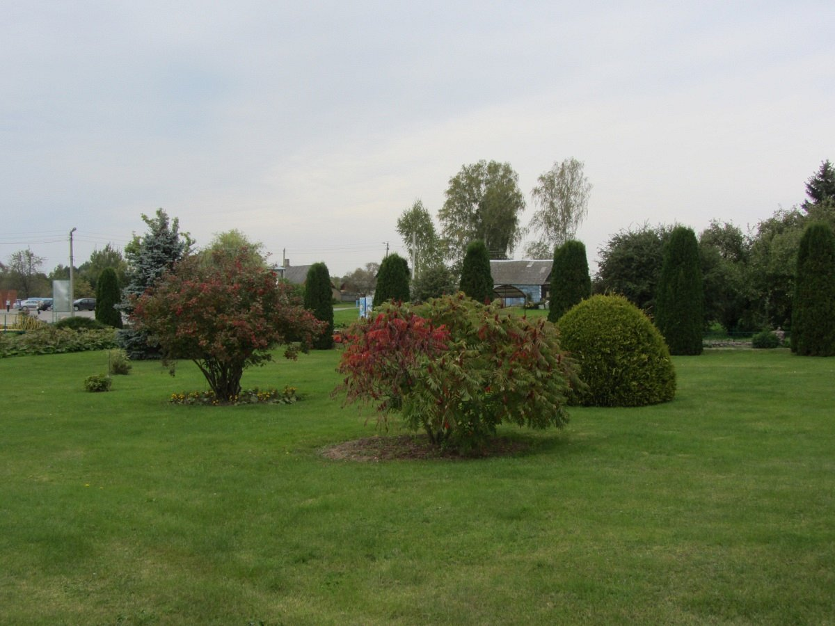 Мосарскія краявіды